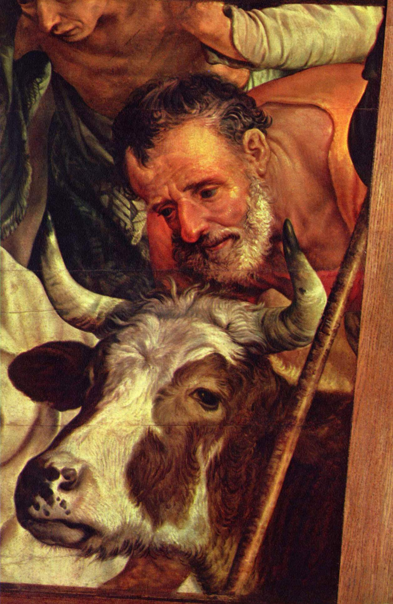 detail